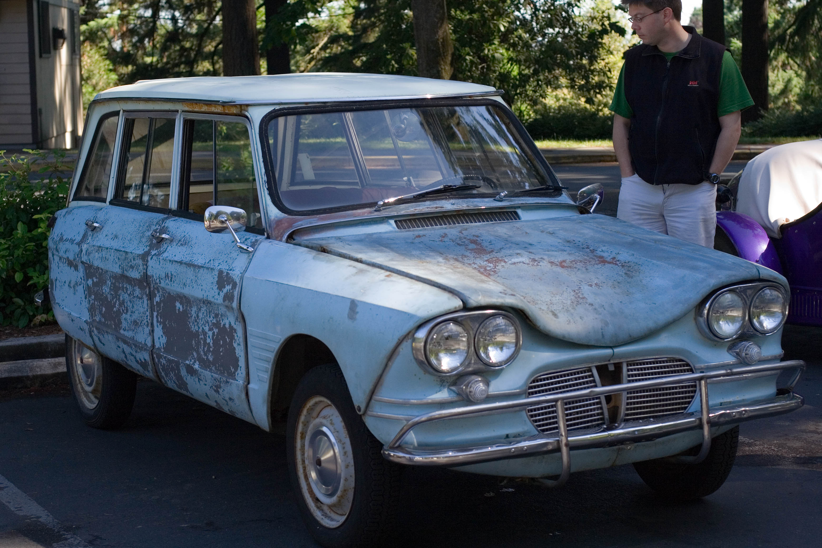 A Citroen Ami wagon.